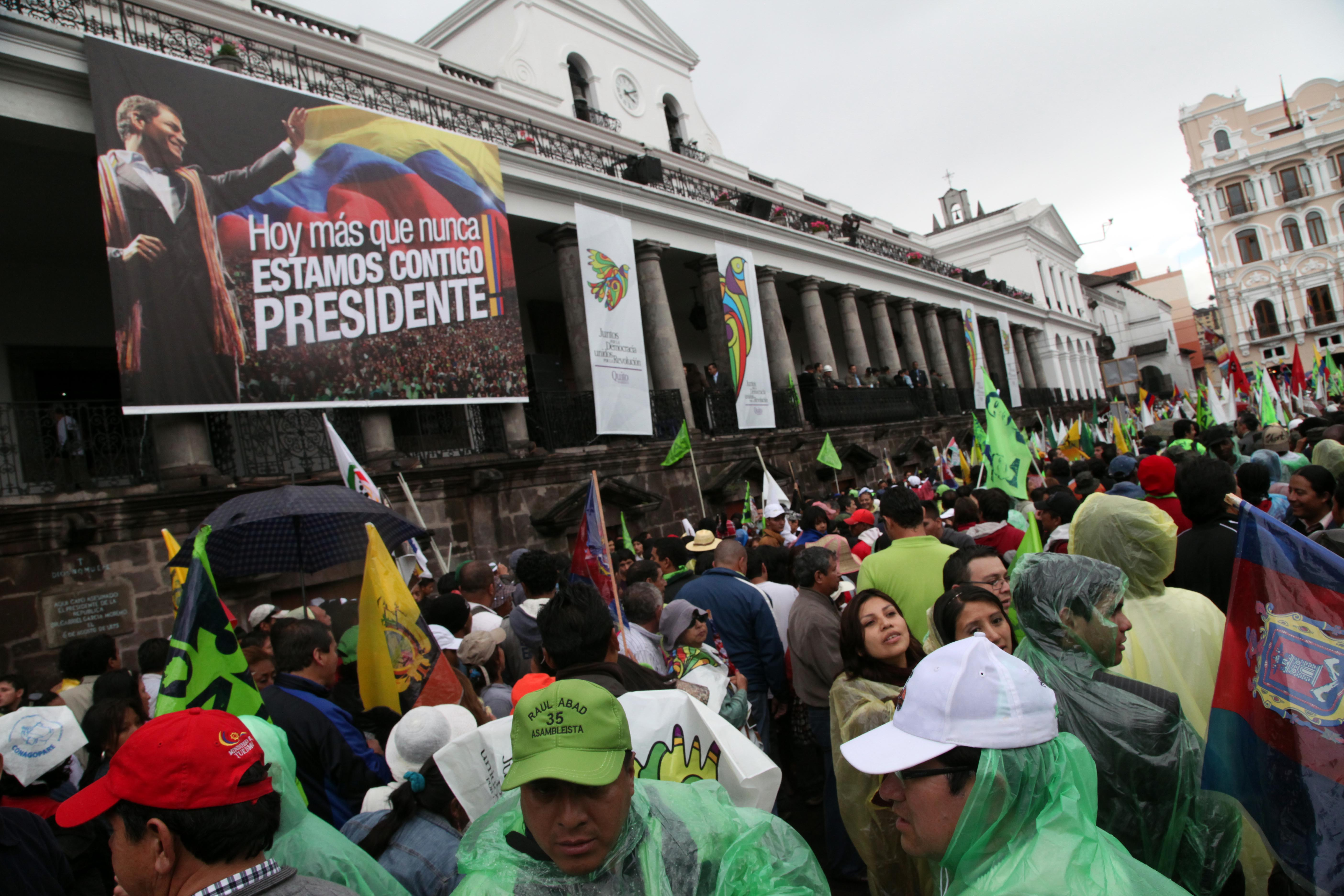 Quito (Ecuador), 22 de marzo del 2012.- Respaldo Multitudinario a la Revolución Ciudadana.Foto: Xavier Granja C/Ministerio de Relaciones Exteriores, Comercio e Integración